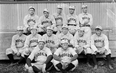 1903 Brooklyn Superbas